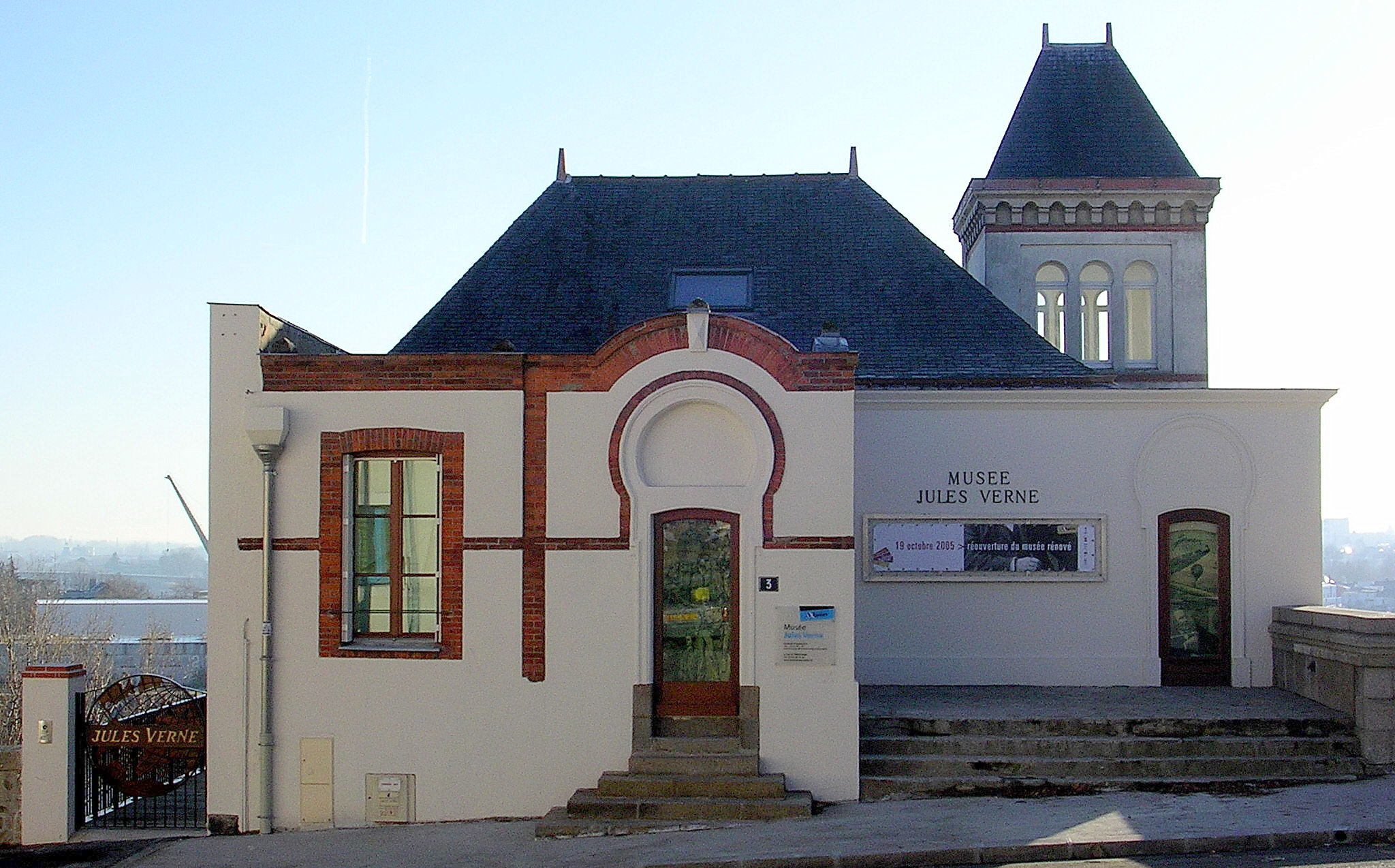 Musée Jules Verne, butte Sainte-Anne à Nantes